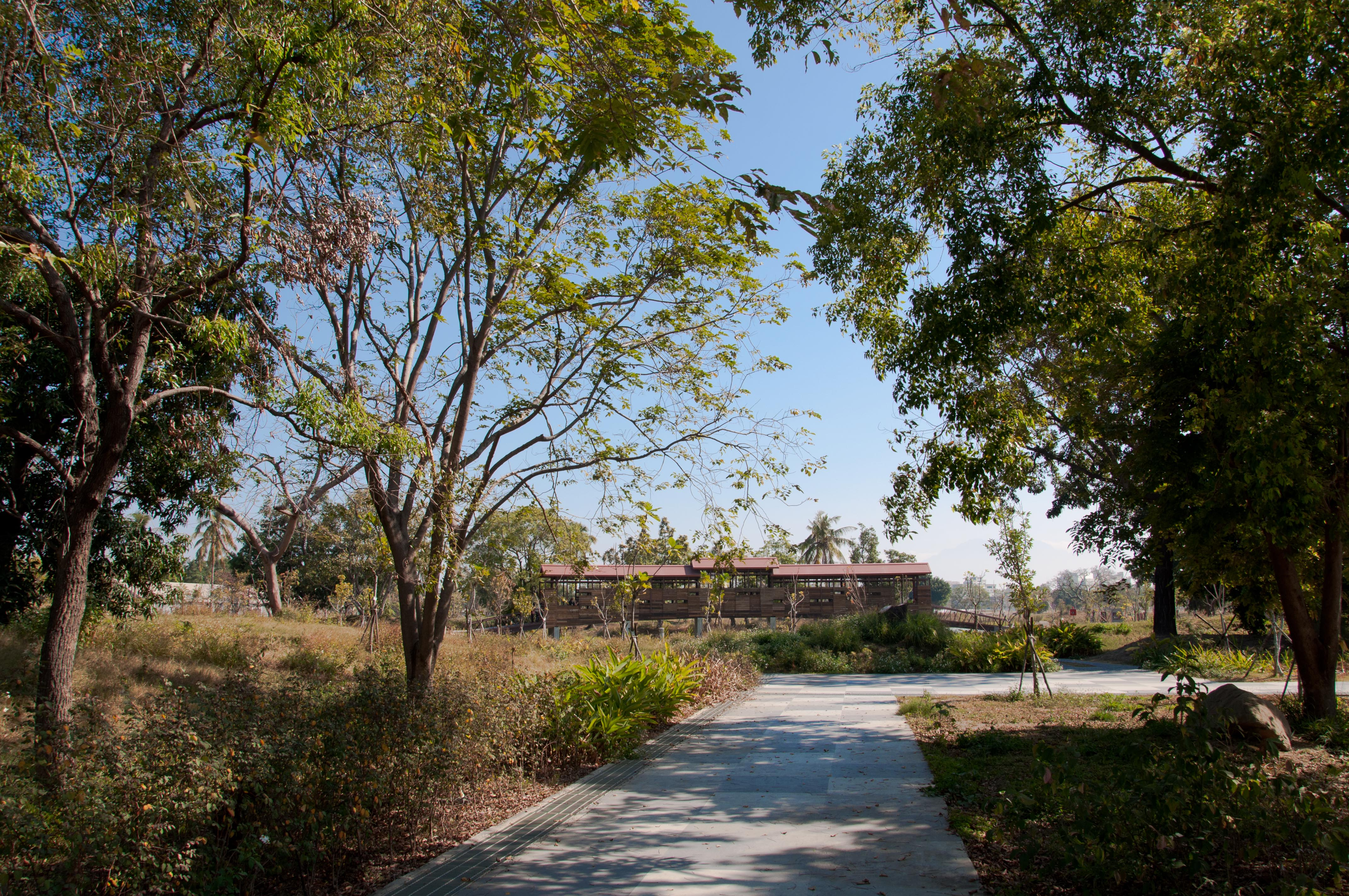 衛武營都會公園自然探索區